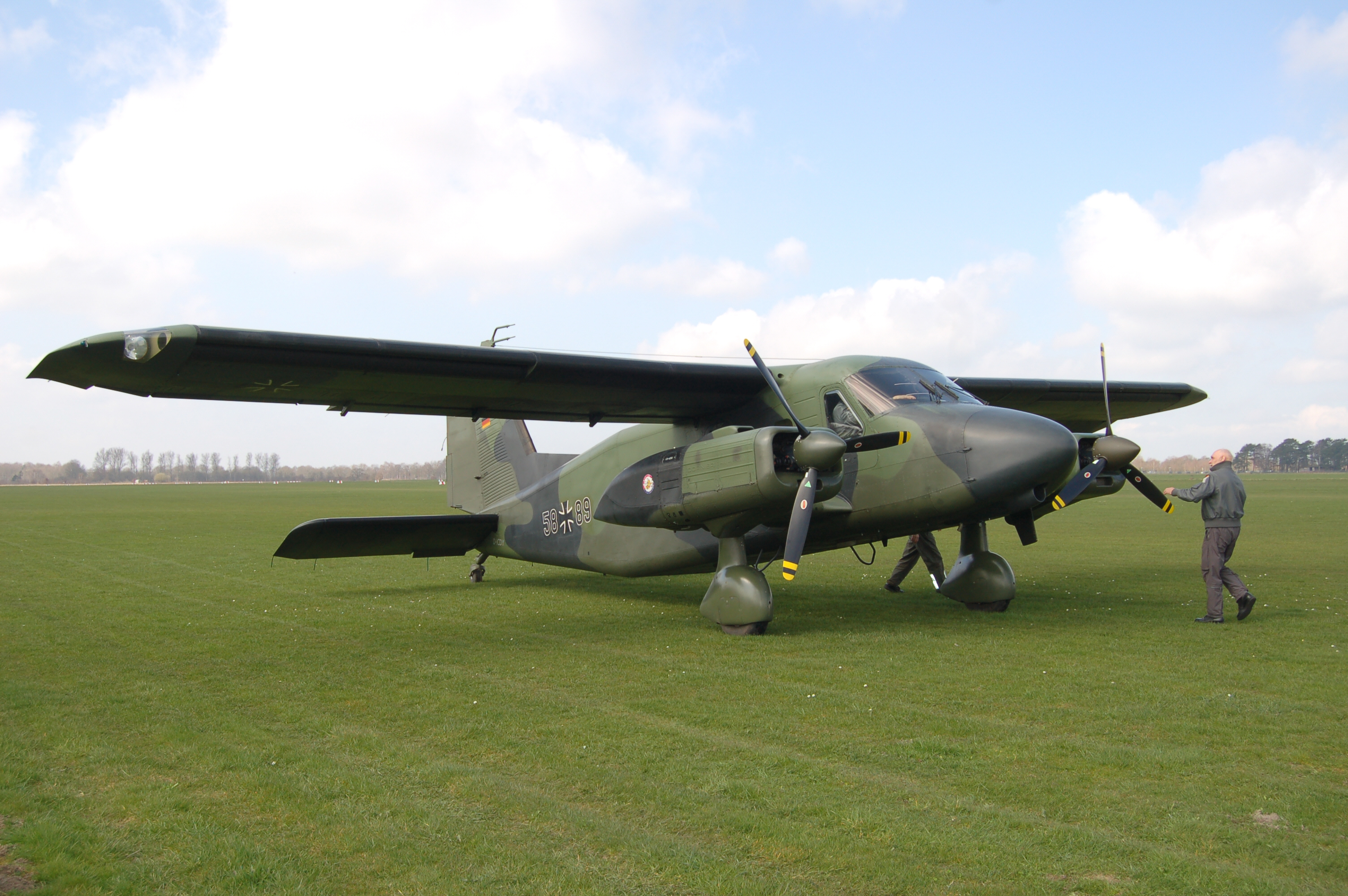 Dornier Do 28 (58/89) auf dem Flugplatz Uetersen.